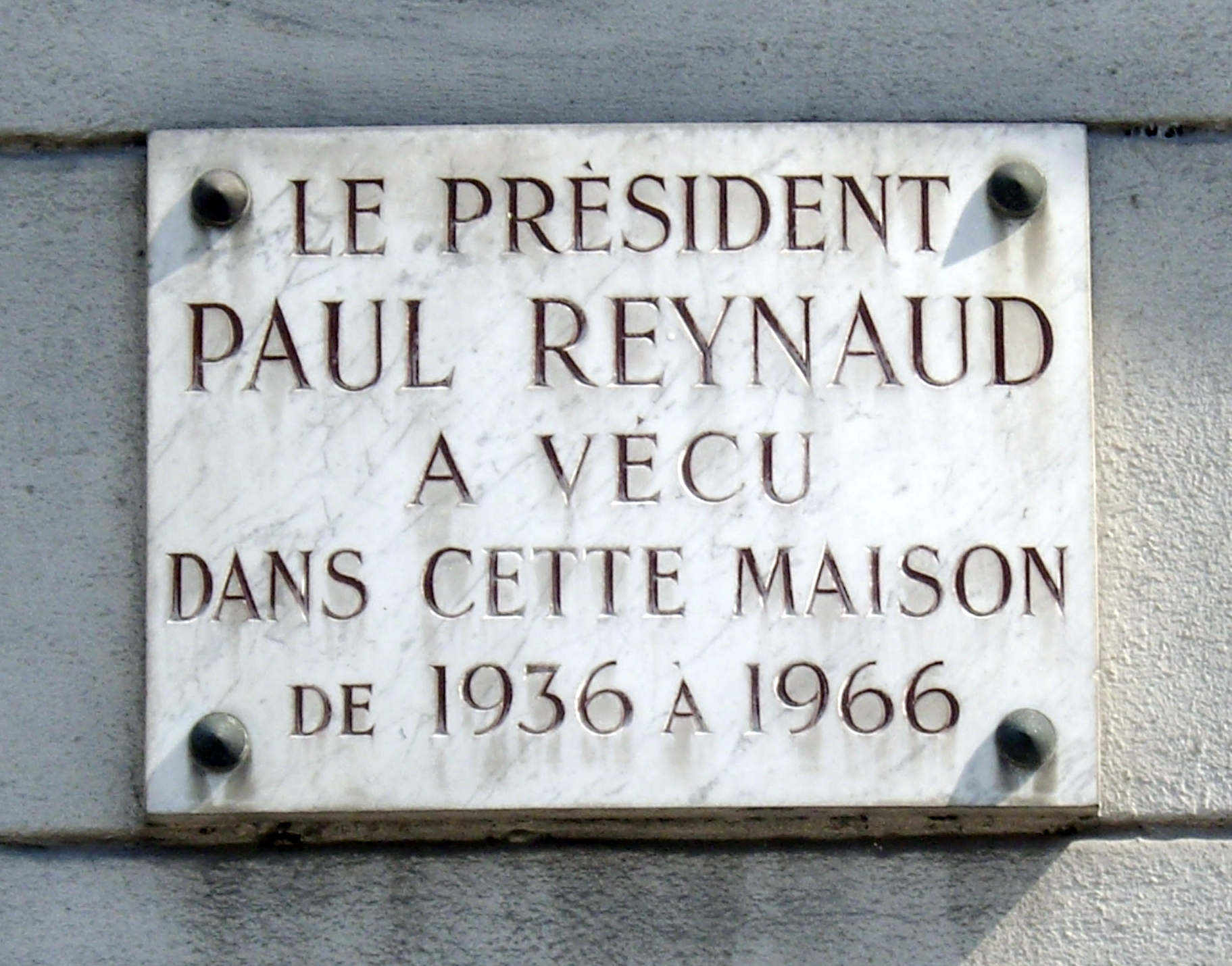 Plaque apposée au n° 5 de la place du Palais-Bourbon, Paris 7e, où demeura Paul Reynaud (1878-1966), président du Conseil, de 1936 à 1966.